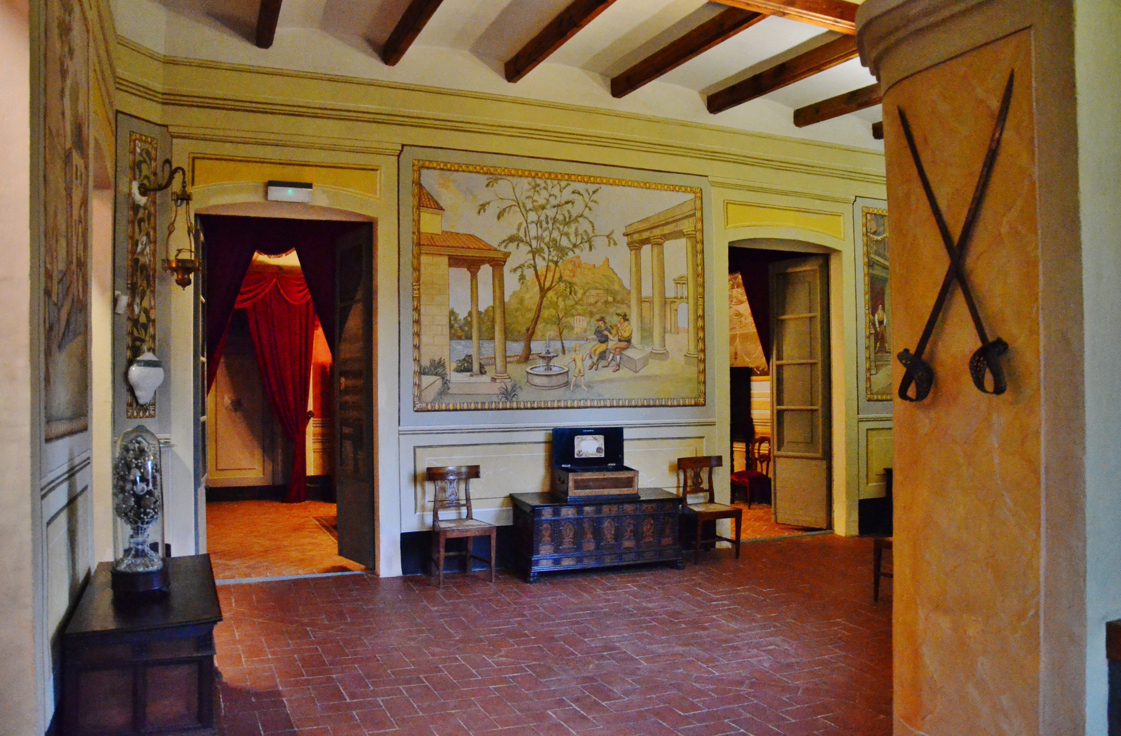 Museu Romàntic Can Papiol (Vilanova i la Geltrú)